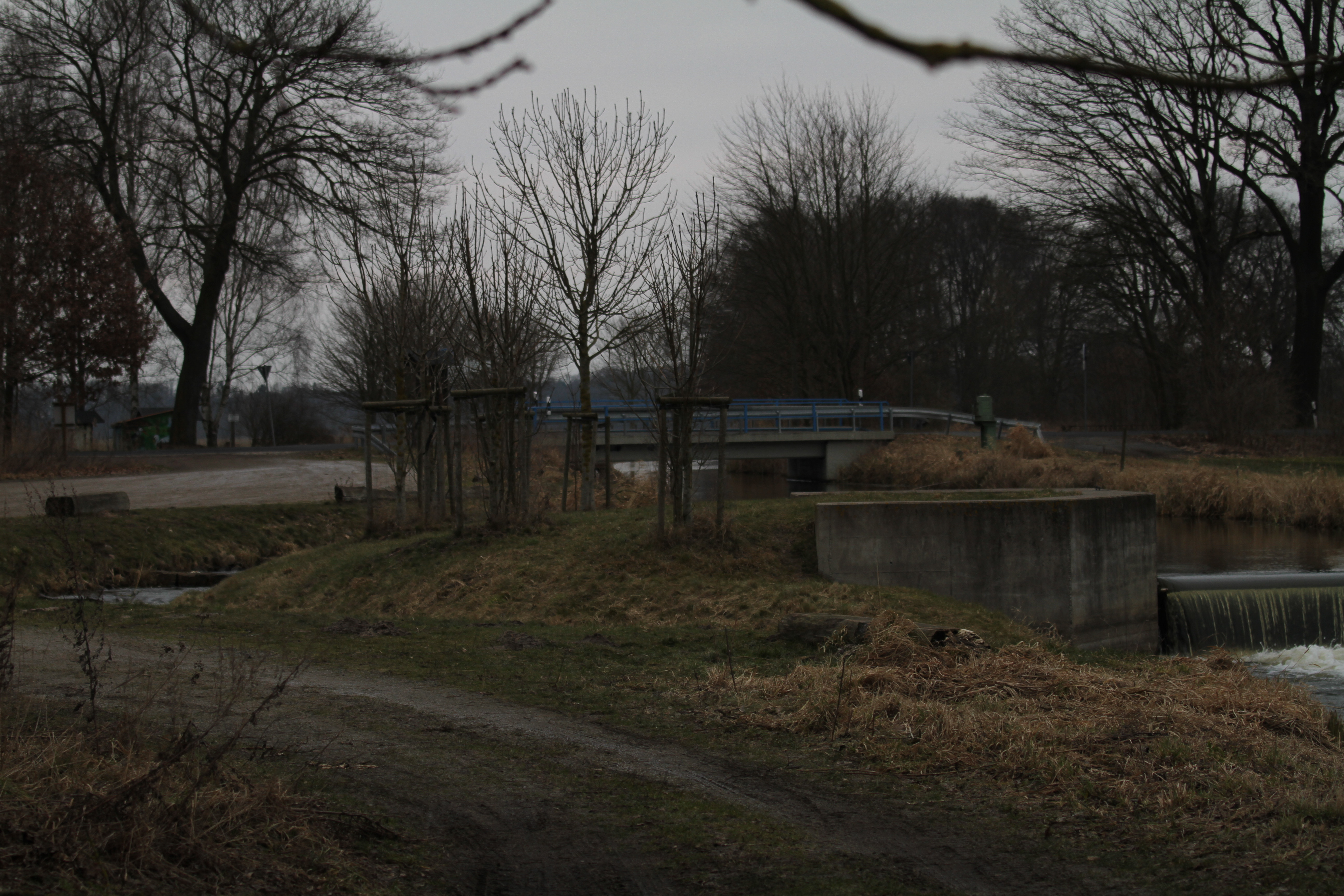 Neuer Kanal. Bildmitte: Unterquerung der K68. Rechts ein Wehr, links eine Fischtreppe.